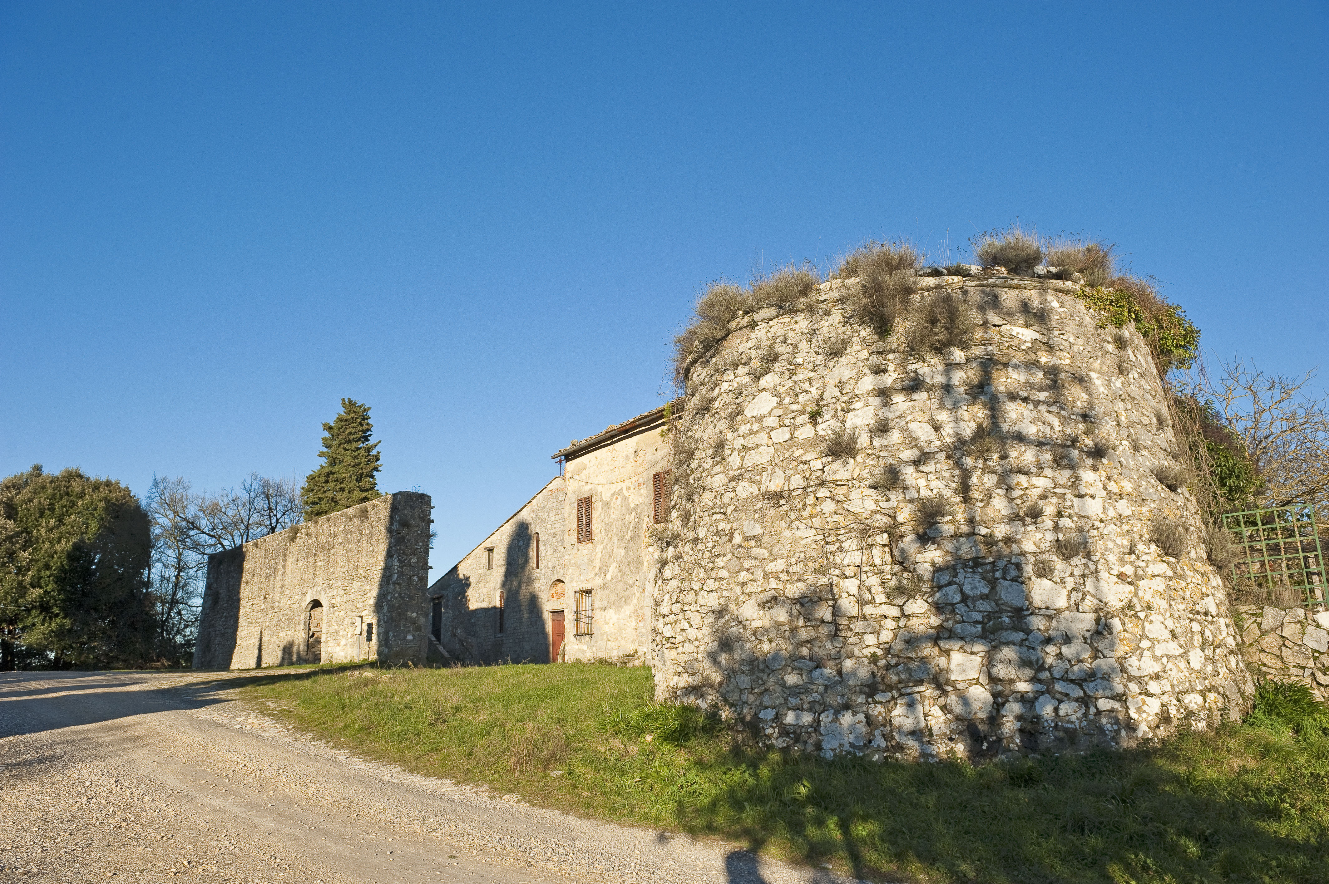 Fortificazioni medievali a Marmoraia, Casole d'Elsa, Siena